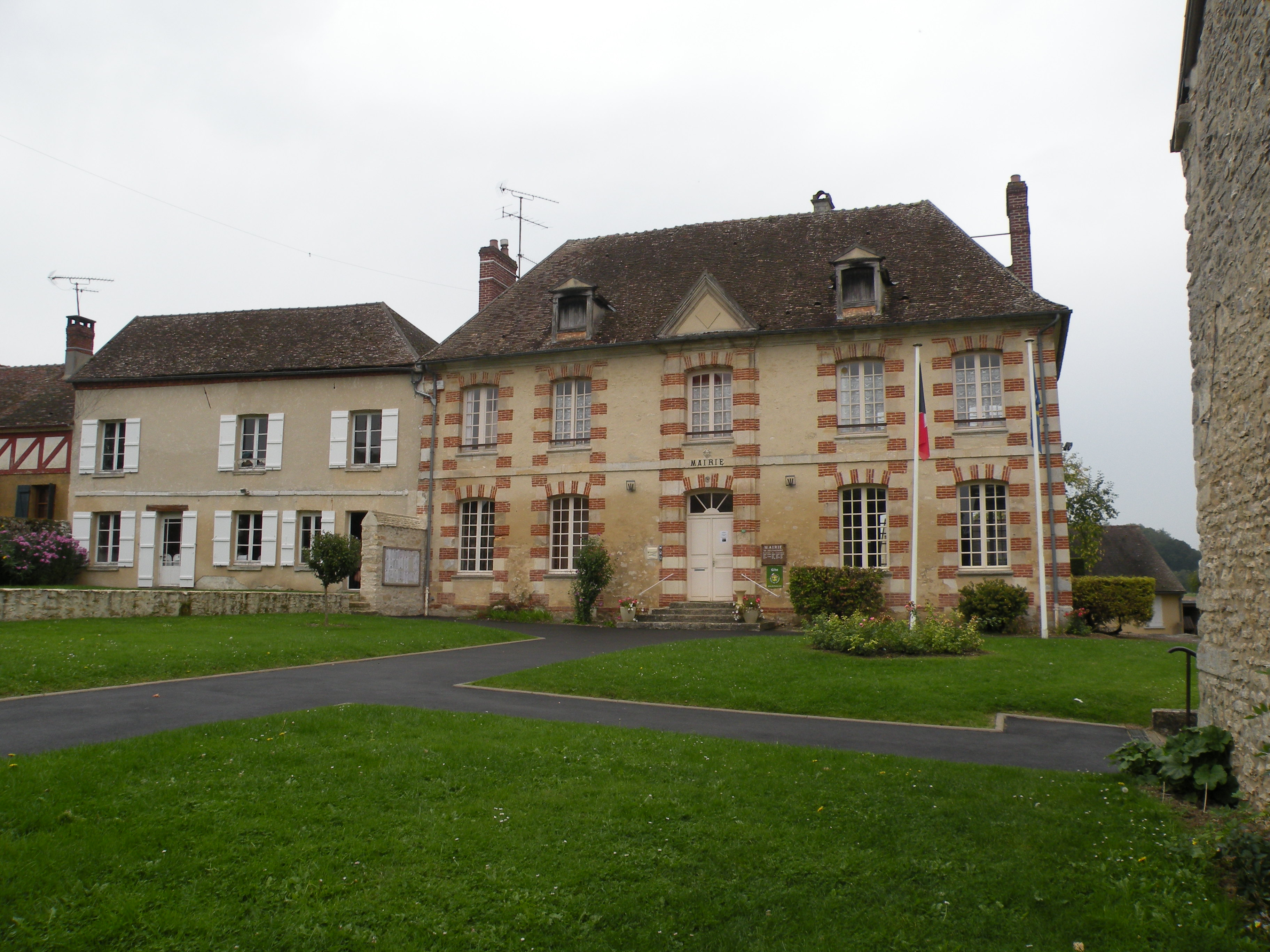 Delincourt mairie